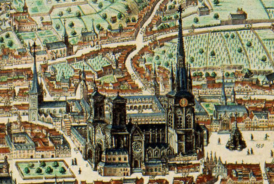 Extrait de la carte de Johan Blaeu 16e siècle